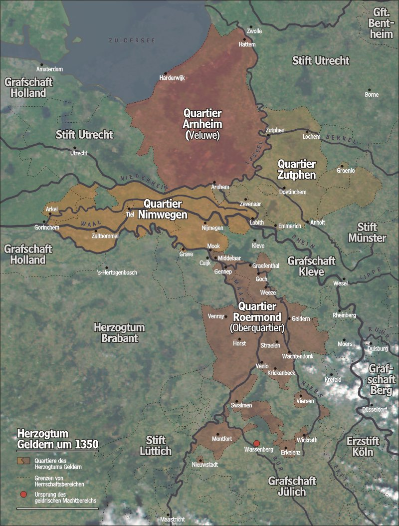 Darstellung zeigt die Quartiere des Herzogtums Geldern um 1350.